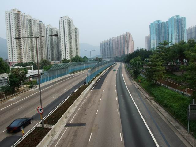 粉嶺公路